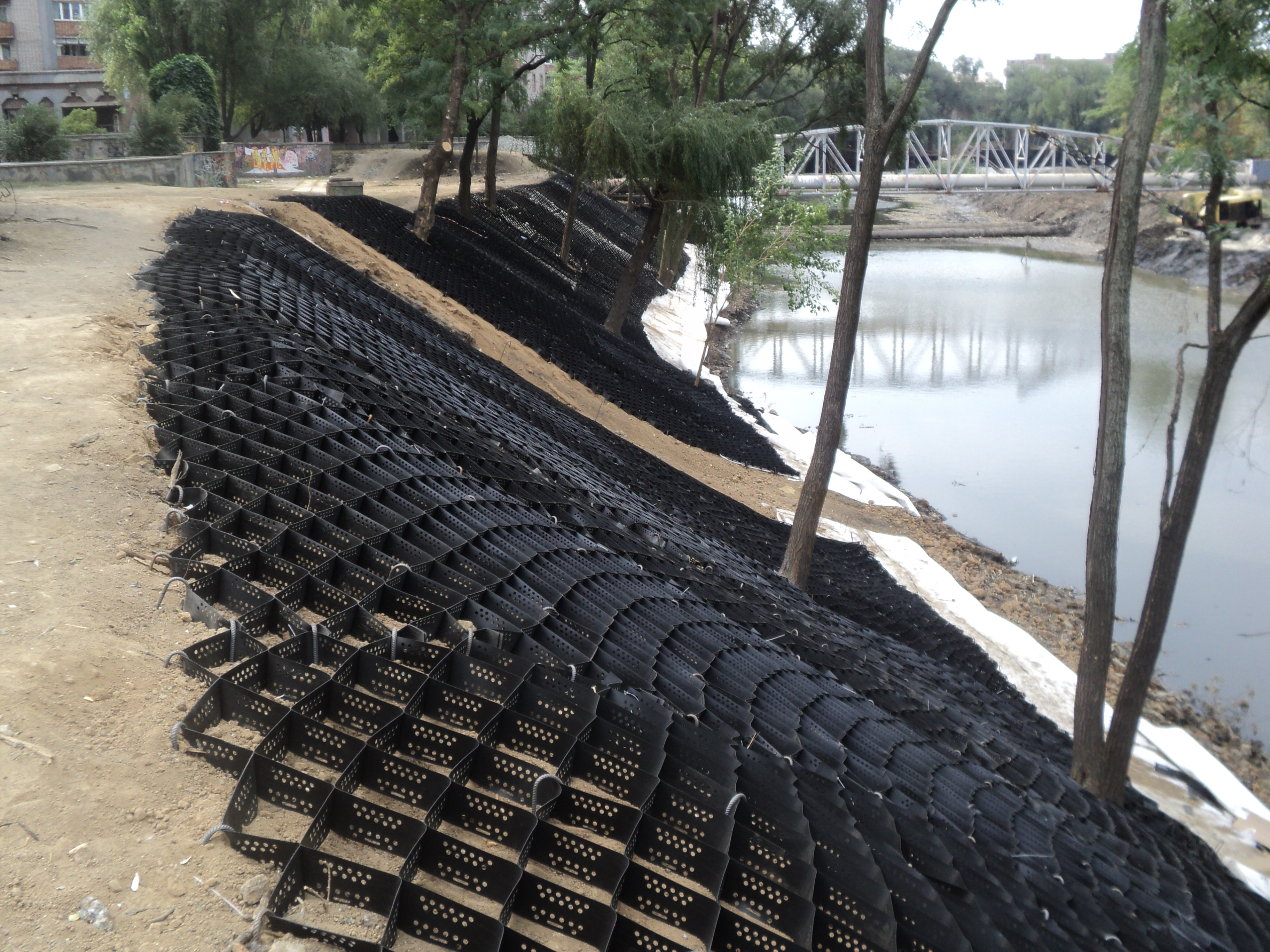 Берегоукріплюючі роботи на Саксагані (Кривий Ріг) Unknown